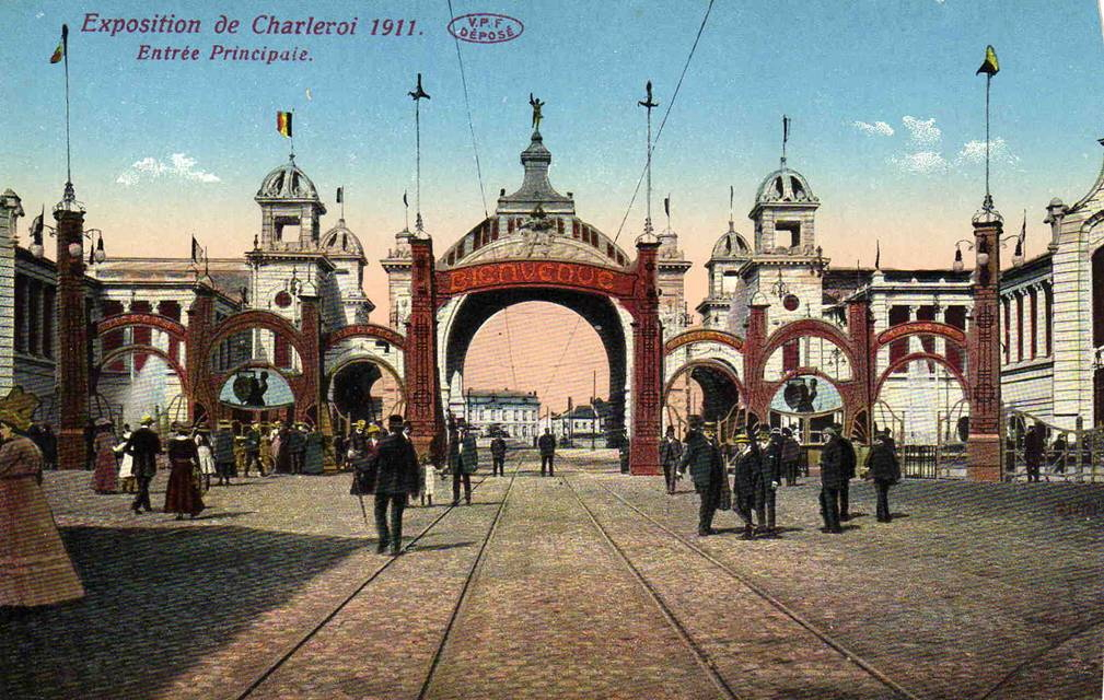 Charleroi (Belgique) - Carte postale de l'entrée principale de l'exposition de Charleroi de 1911.